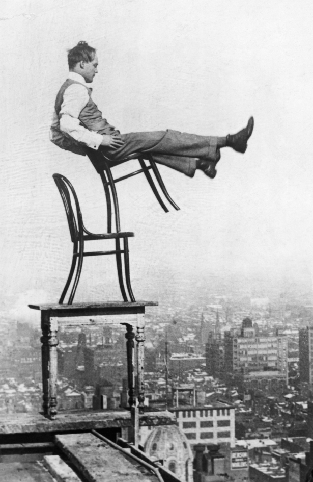 Muž balancující na židlích značky Thonet.